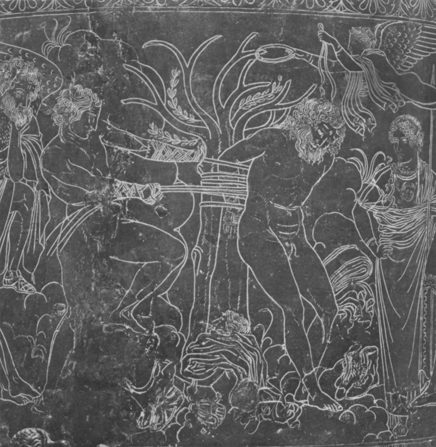 Cista ficoroni, scena